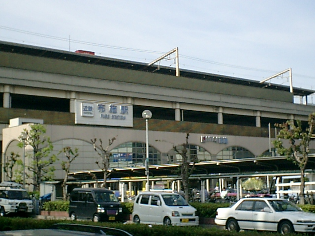 近鉄布施駅